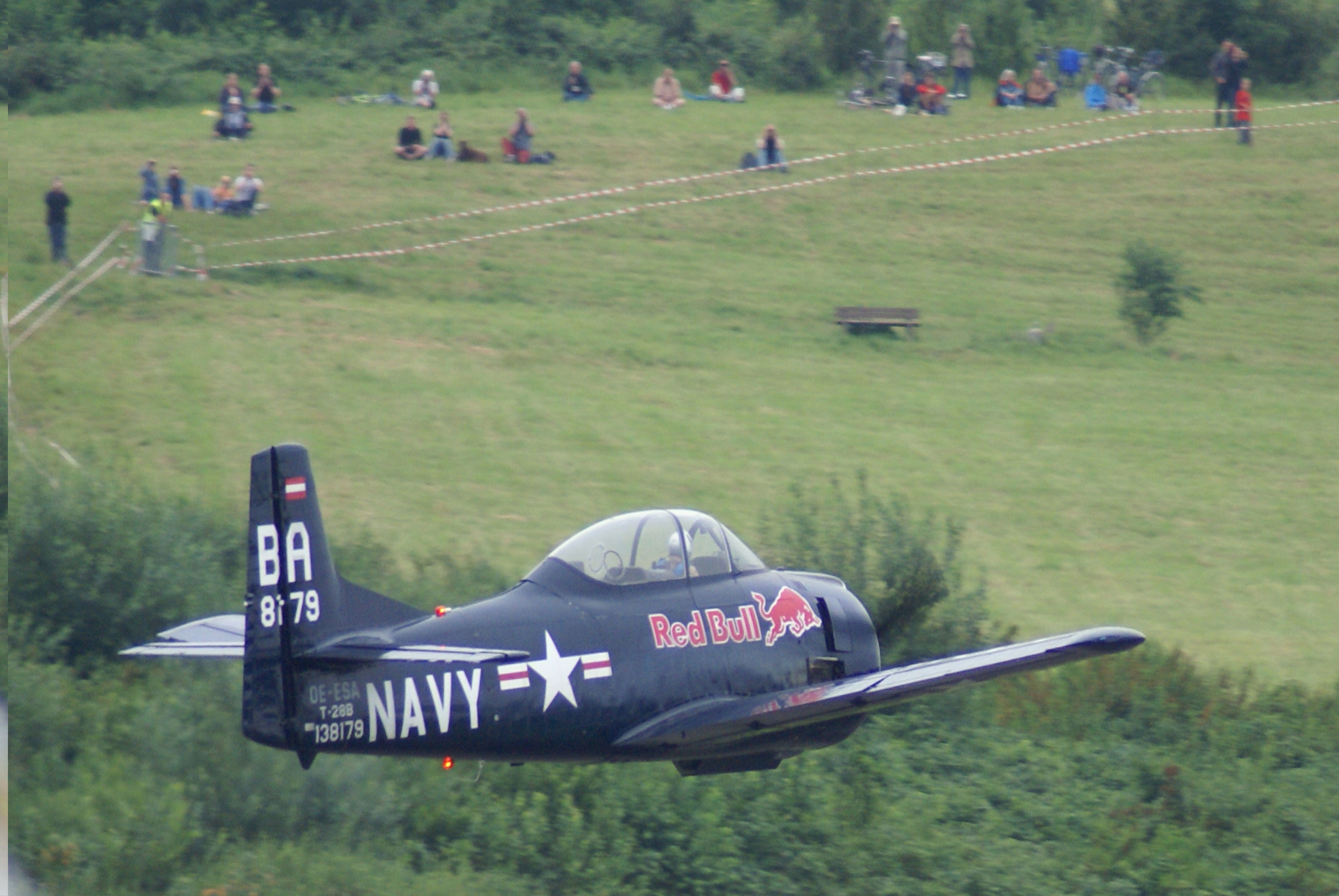 Kunstflug sponcered by Red Bull